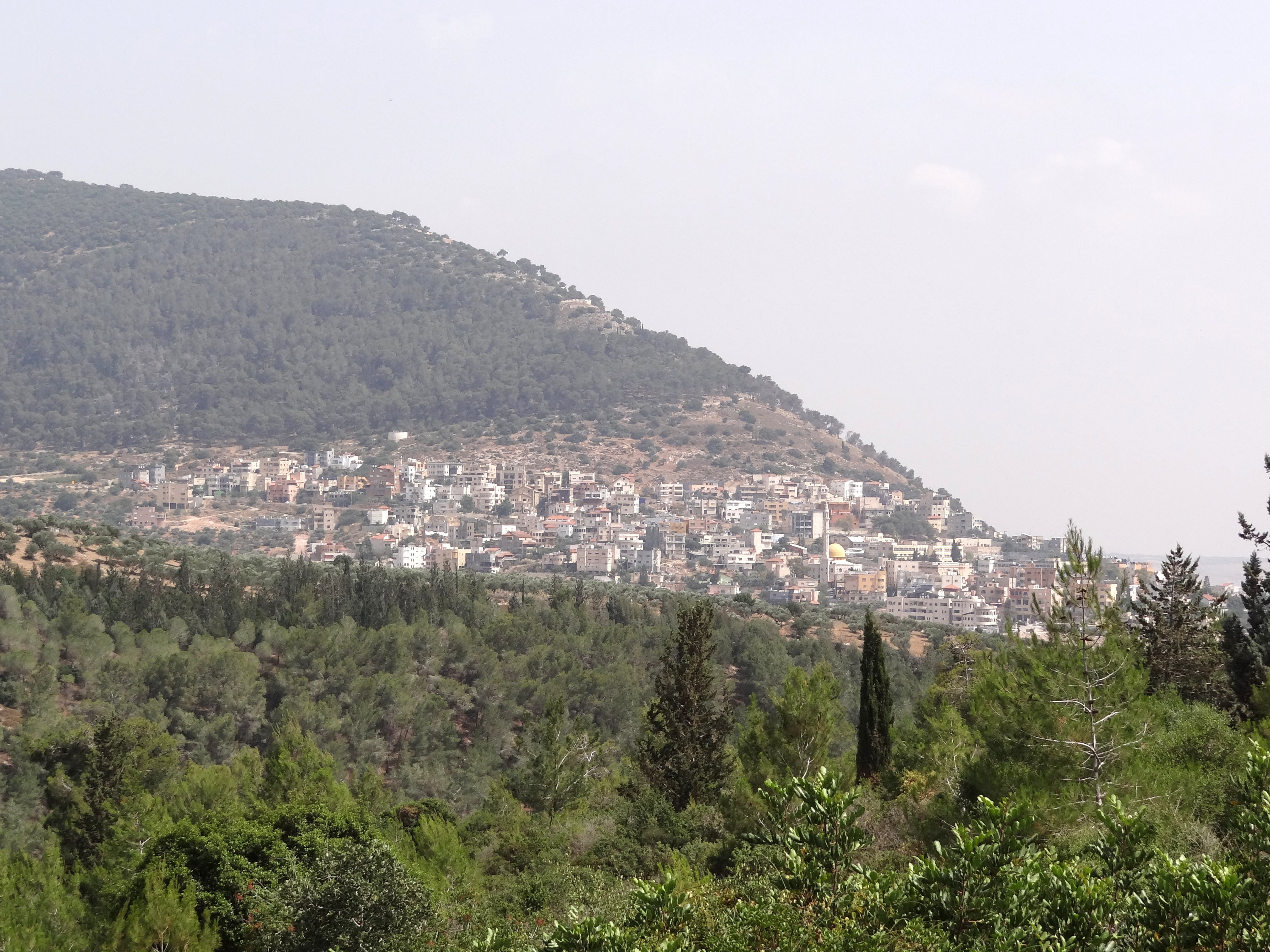 היישוב הבדואי דבוריה מבט מדרך נוף יער בית קשת מתצפית הר תבור בחלק התחתון ערוץ נחל דבורה